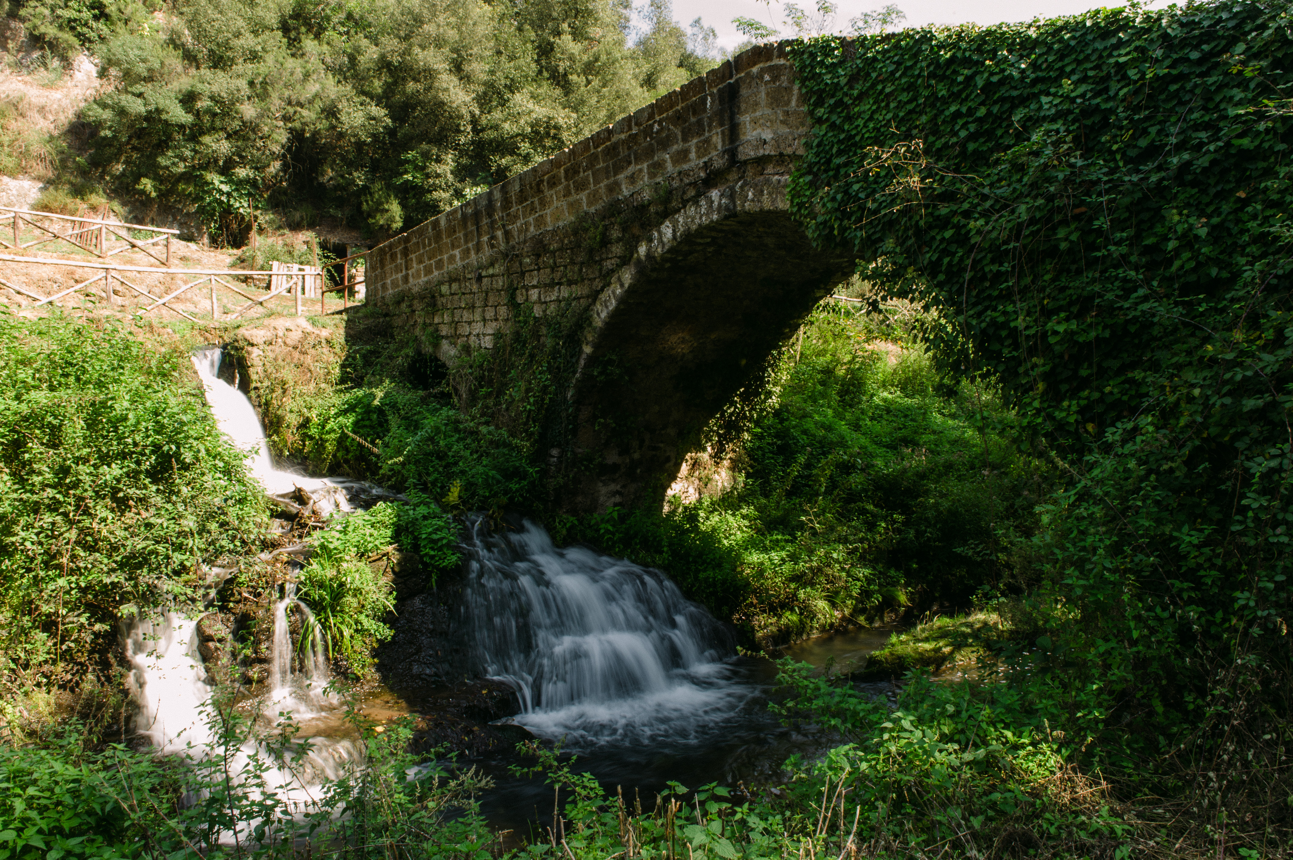 Forre di Corchiano This is a photo of a monument which is part of cultural heritage of Italy. The authorisation for taking photos of this object was provided by the World Wide Fund for Nature Italy.